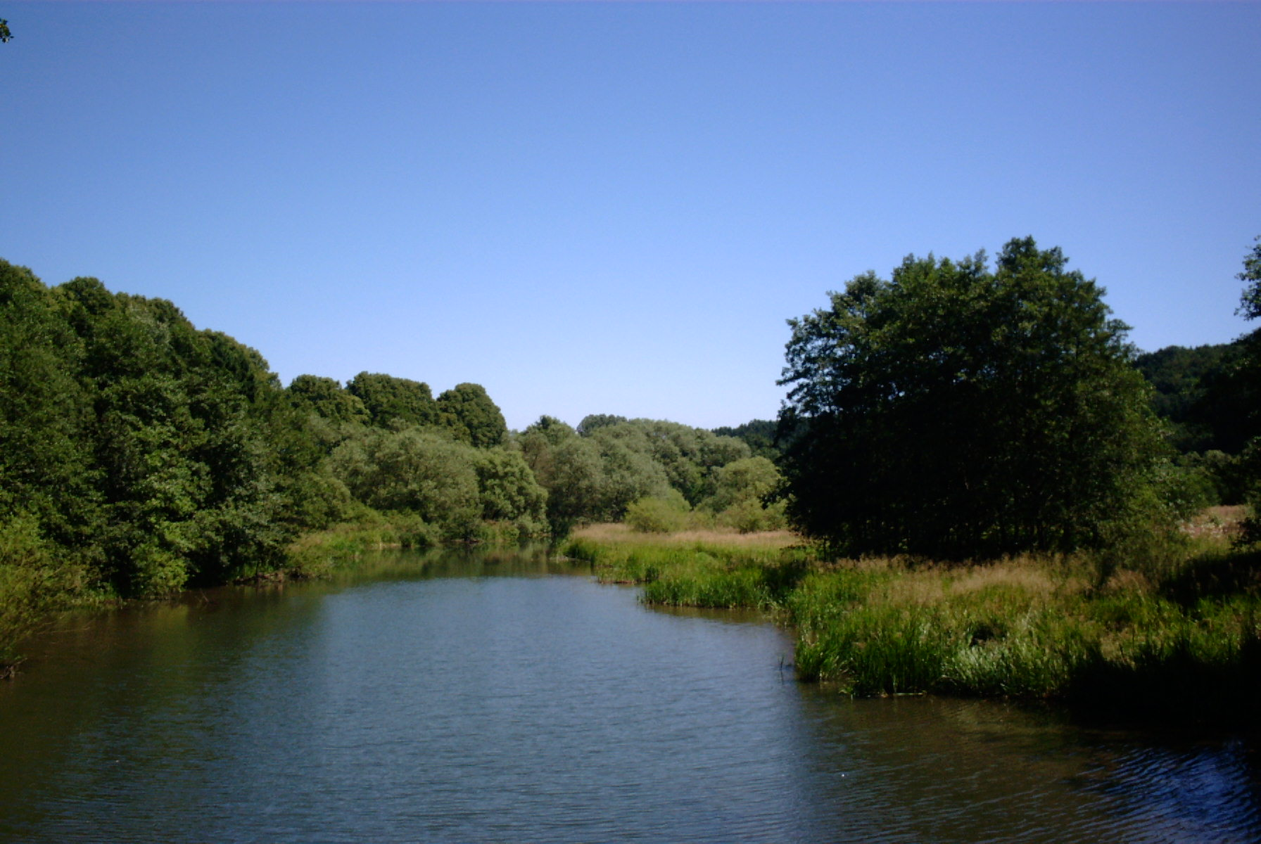 Beschreibung: Wipperfürth, Wipperfürth, Wipperfürth Author: J. Berger Genehmigung liegt Benutzer:Trexer vor. Zitat: "Ich erhebe keine (keinerlei) Rechte an diesen Fotos. Jeder darf sie zu jedem gesetzlichen Zweck benutzen, wie er mag." Citation: " I raise none rights in these photos. Everybody may use them for every lawful purpose as he may. "